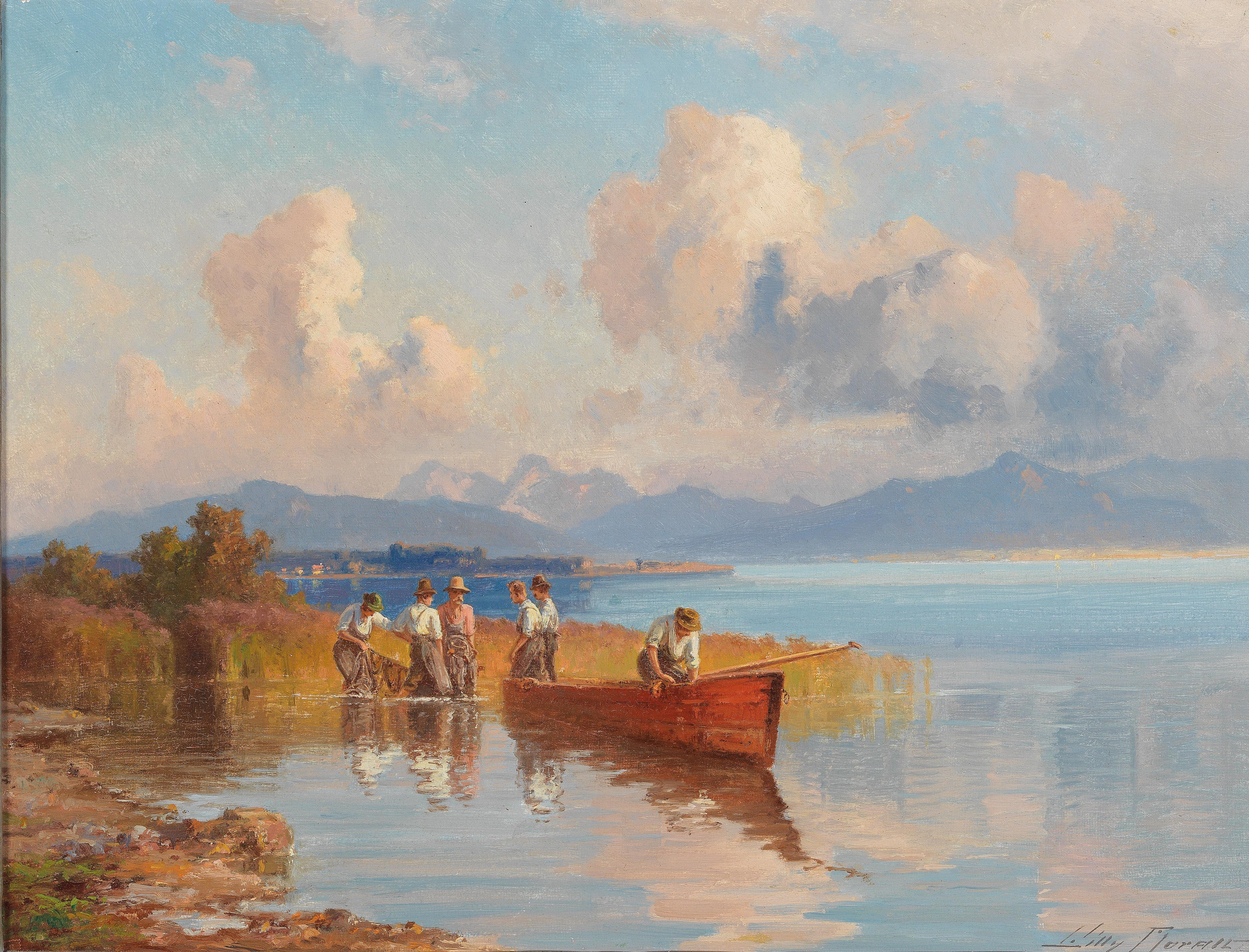 Chiemseefischer, signiert "Willy Moralt", Öl auf Leinwand, 50 x 64.5cm